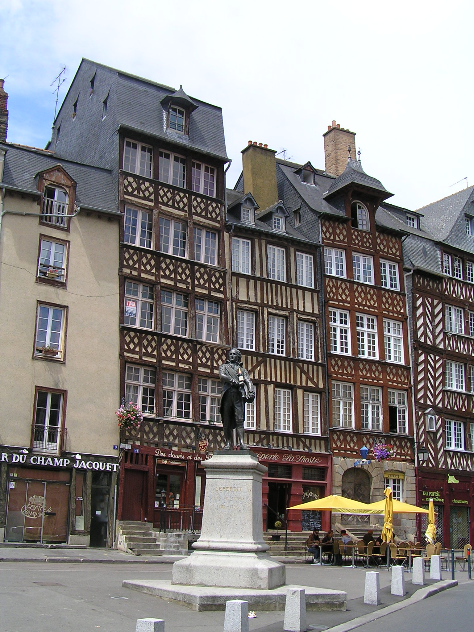 maison médiévale, place du Champ-Jacquet à Rennes à Rennes et statue de Leperdit